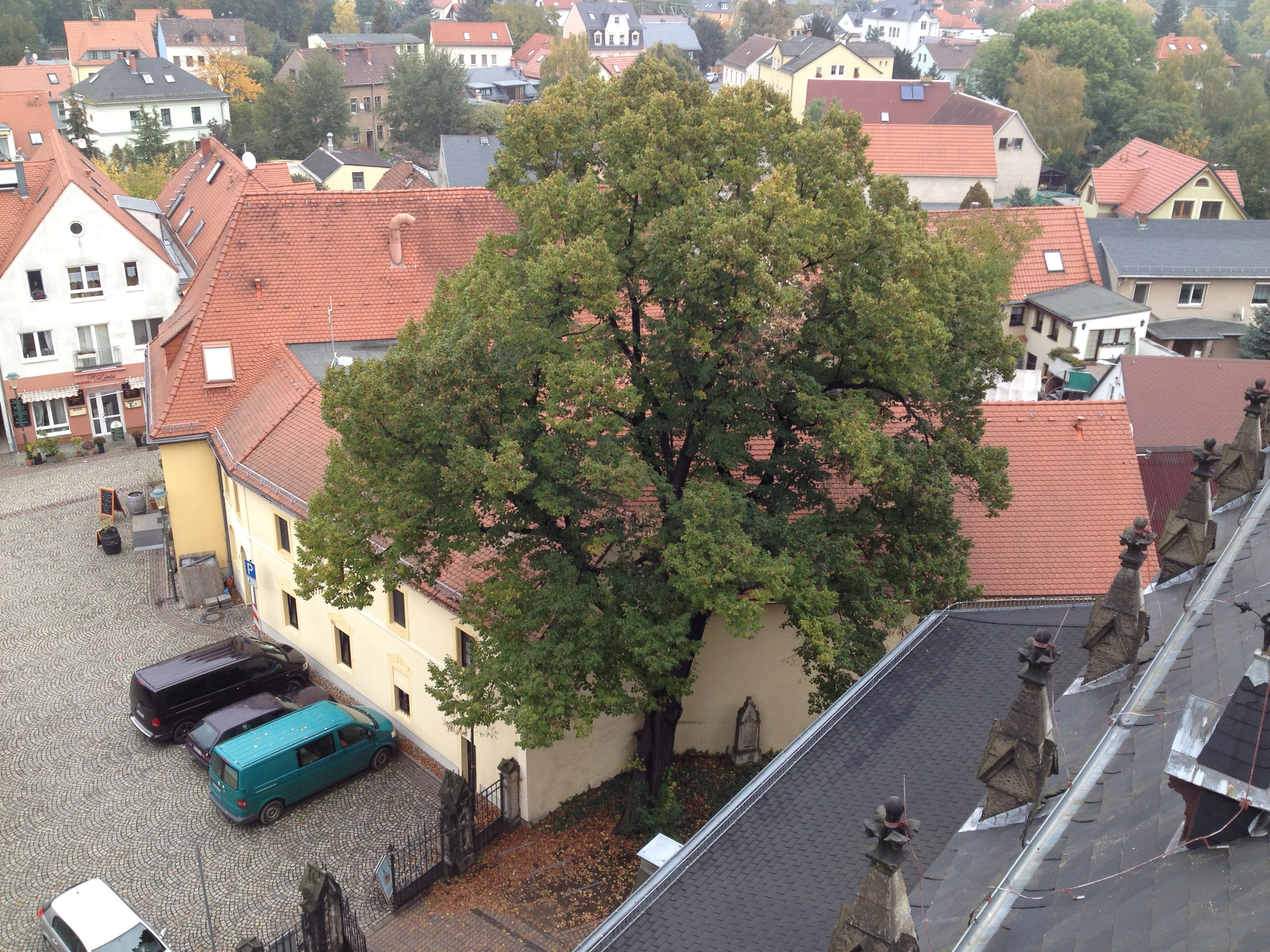 Radebeul Oberschänke vom Kirchturm der Friedenskirche aus